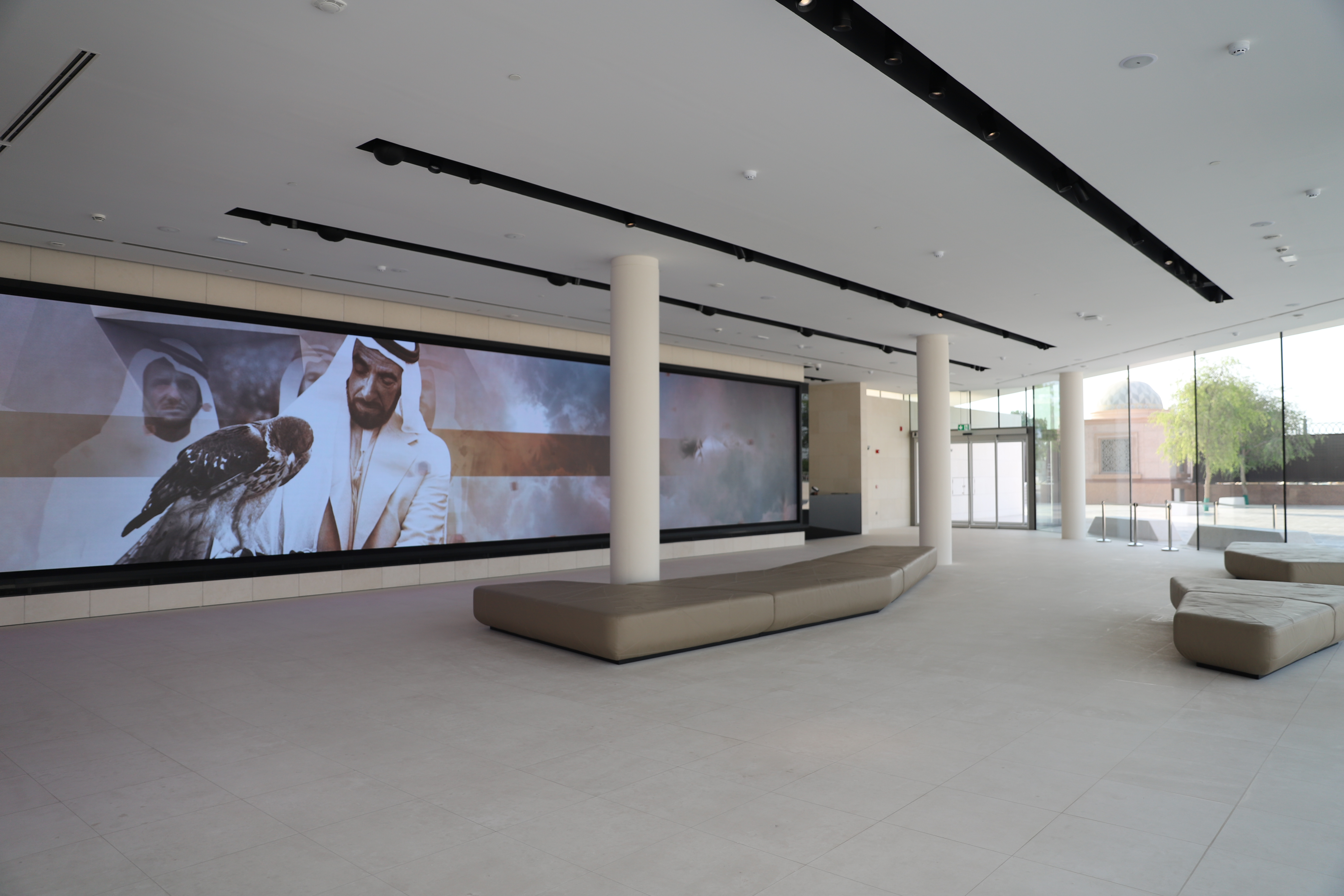 صرح زايد المؤسس - الدخول